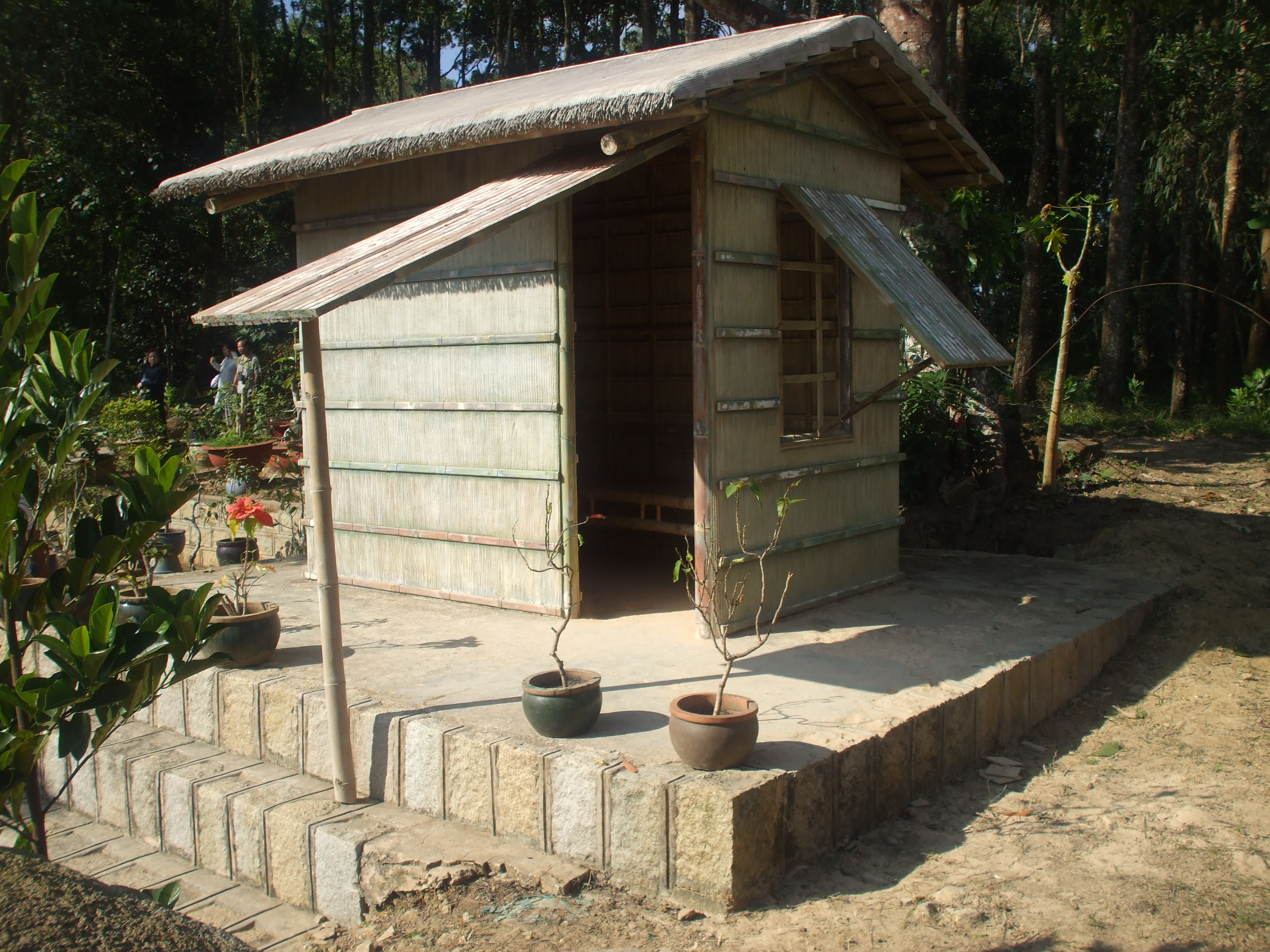 Am tu bằng tre lá của Hòa thượng Thích Thiện Quang ở sau chùa Vạn Linh, núi Cấm (Tịnh Biên, An Giang, Việt Nam). Am xưa đã hư hỏng, nay được làm lại bằng xi măng để kỷ niệm.